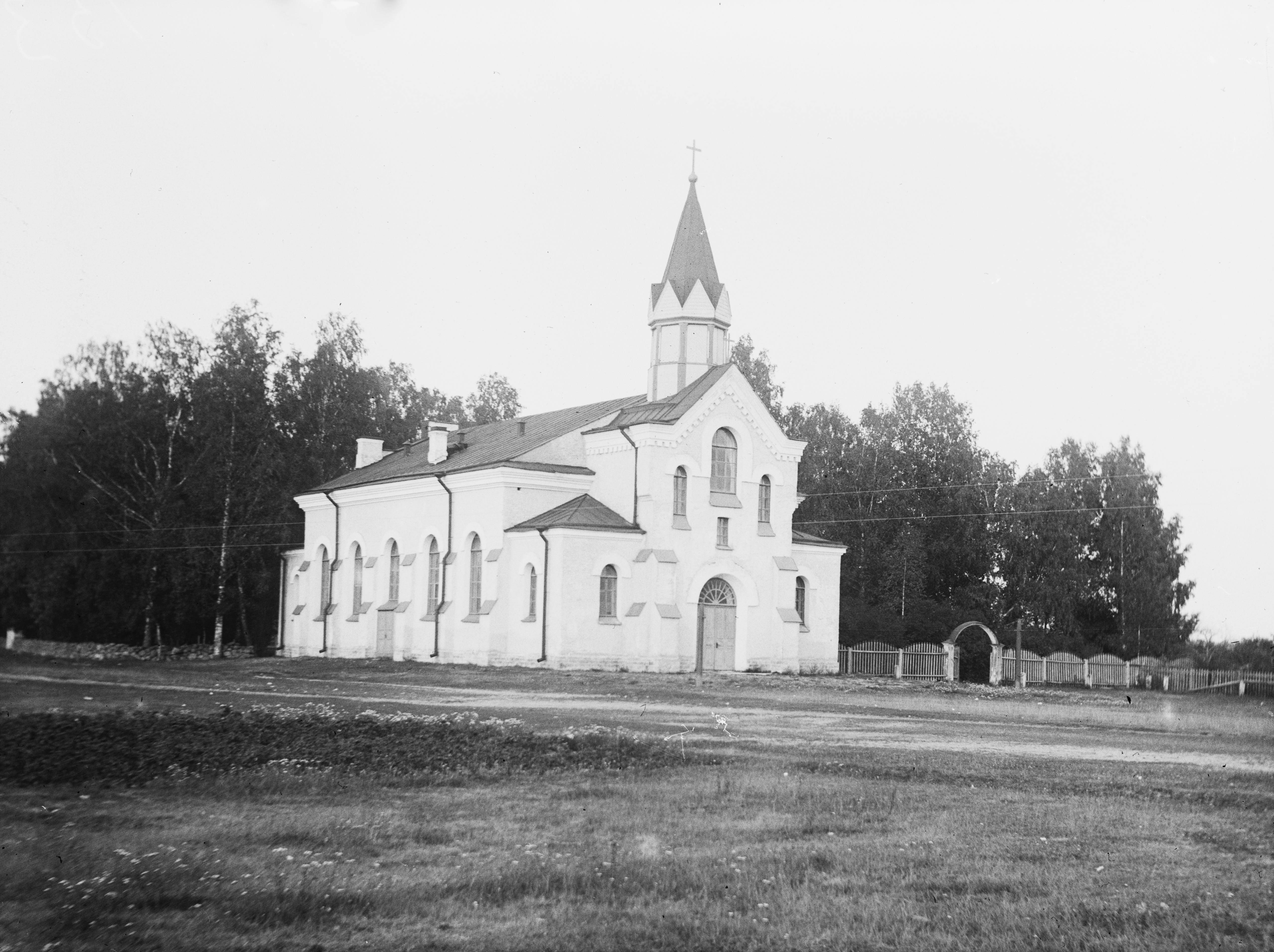 Кирха в Большом Кузёмкино